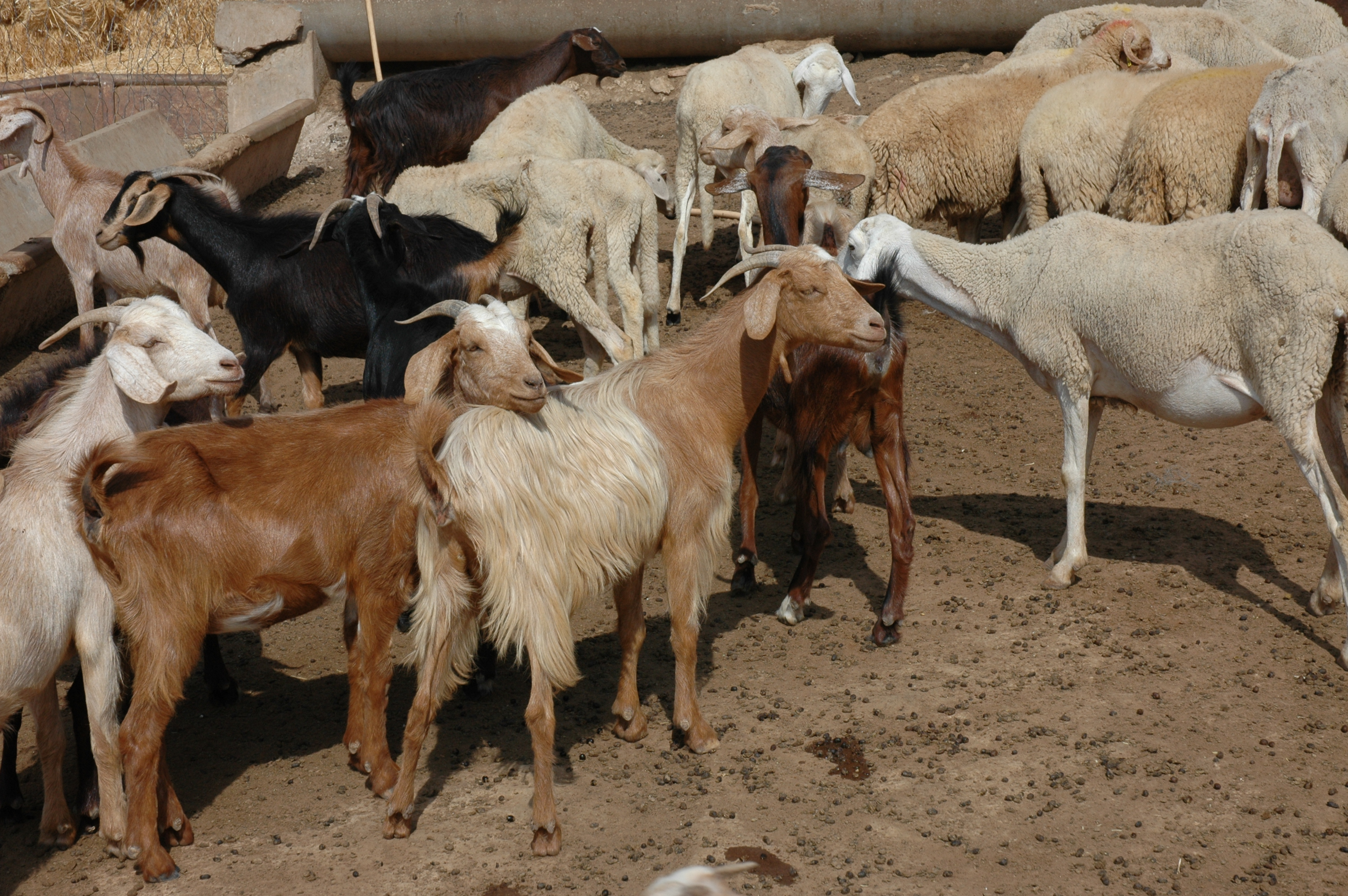 Troupeau mixte ovins-caprins (races locales)